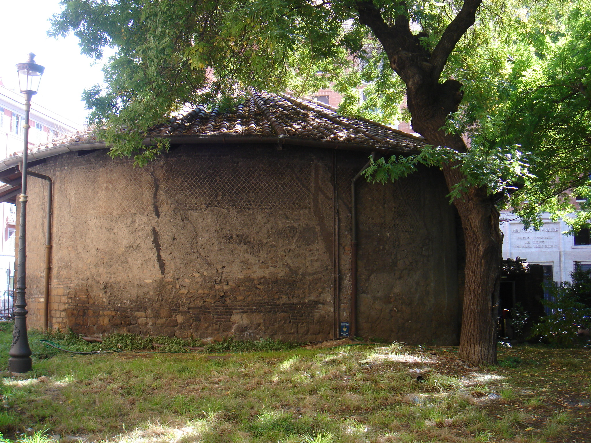 Roma, Auditorium di Mecenate, esterno